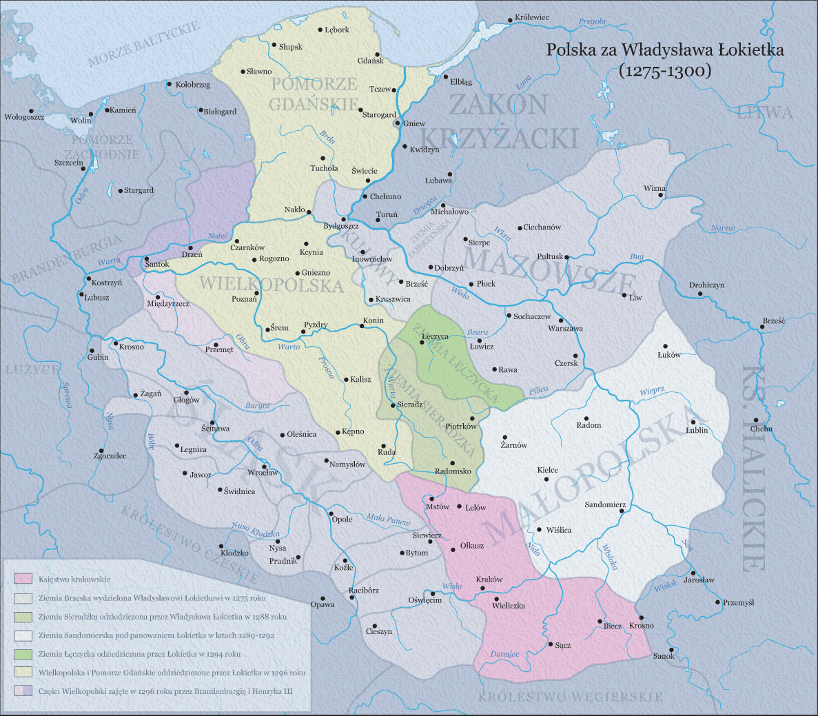 Ziemie polskie za Władysława I Łokietka w latach 1275–1300